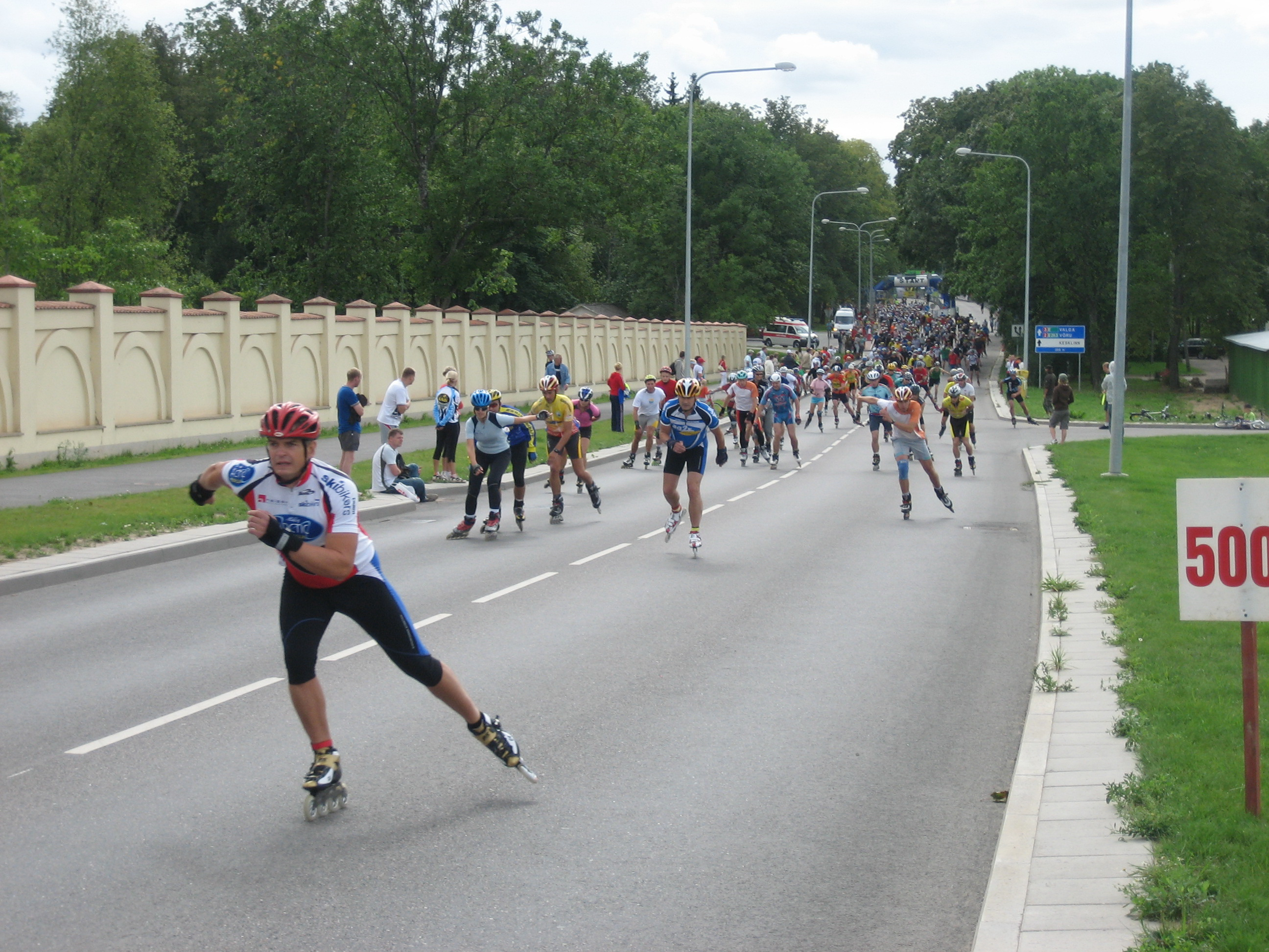 Esimene Rulluisumaraton